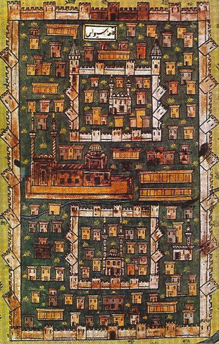 Matrakçı Nasuh'un 1537 yılında çizdiği Sivas minyatürü.